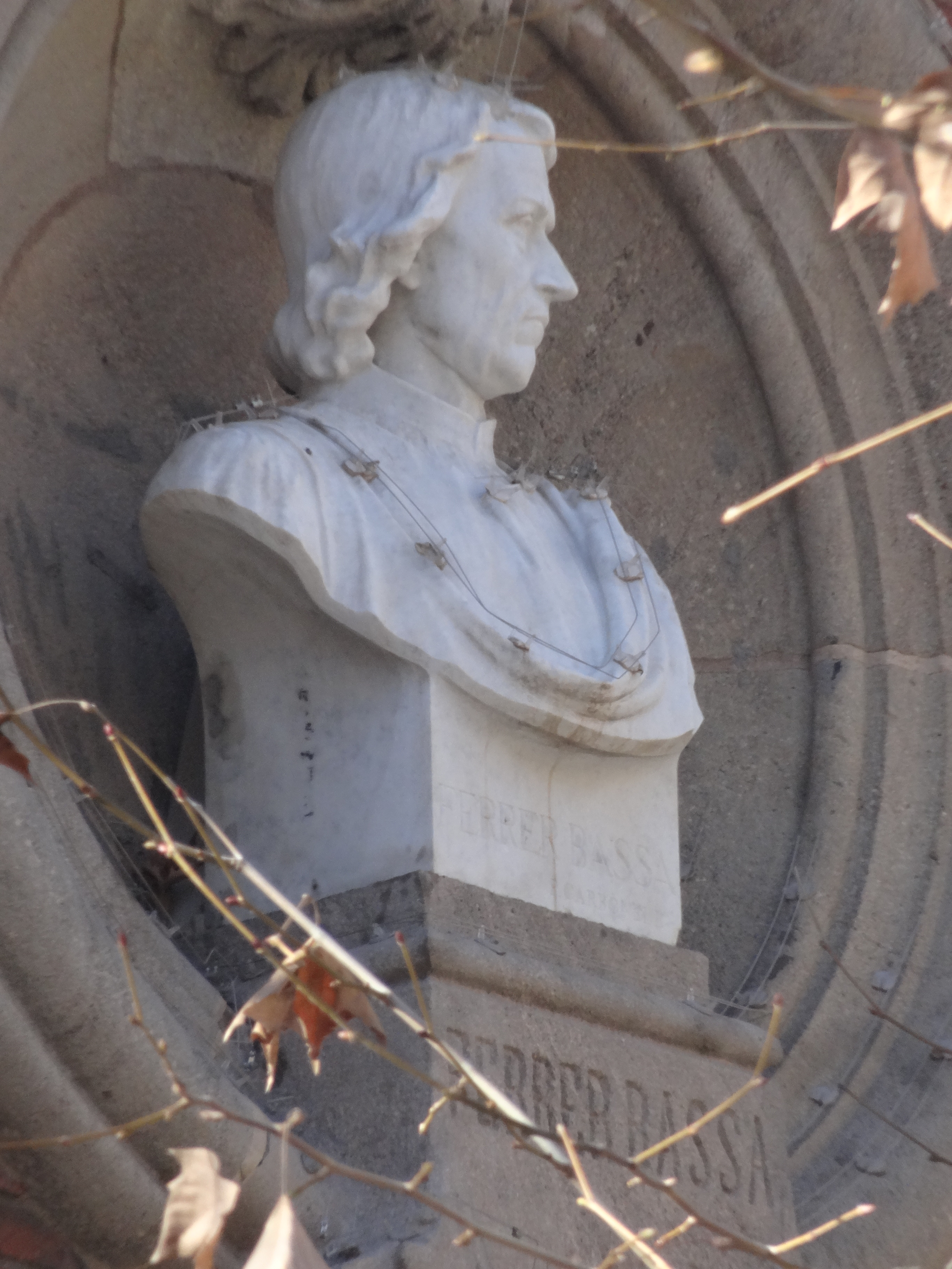 Busts a l'exterior del Palau del Parlament de Catalunya. Vistos des del zoo. Bust de Jaume Ferrer Bassa, obra de Pere Carbonell Huguet.